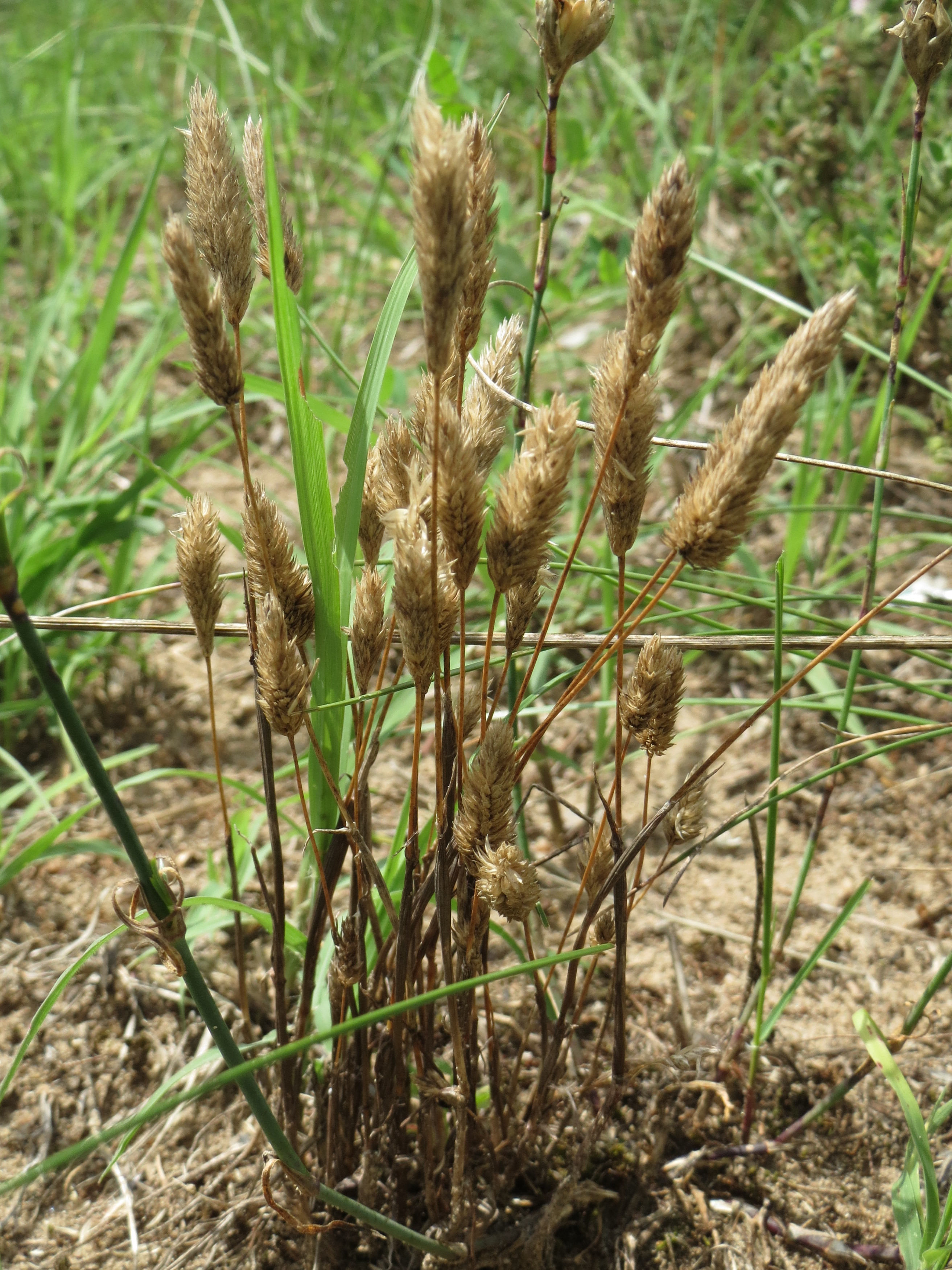 Sand-Lieschgras (Phleum arenarium) im Mainzer Sand